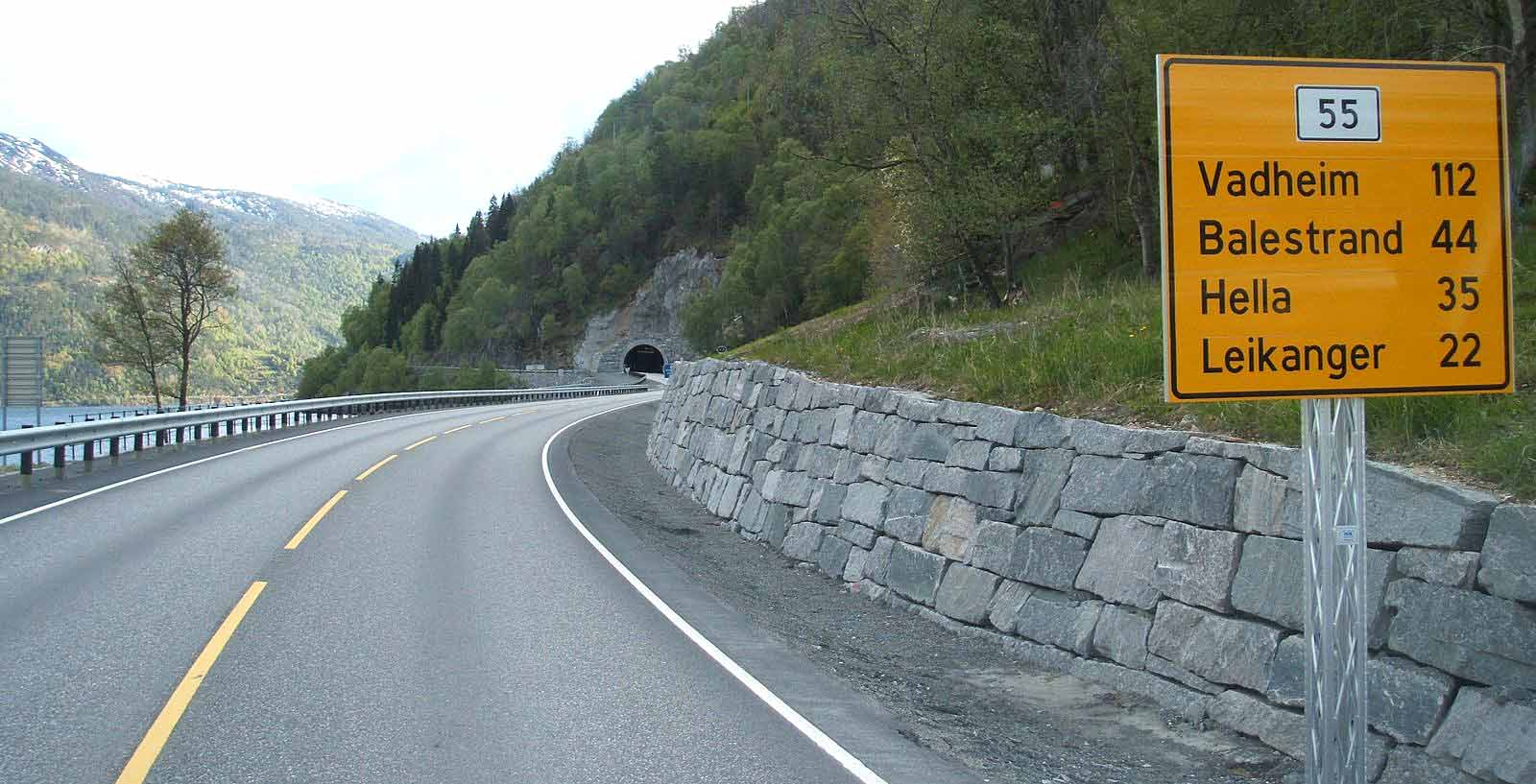 Stedjebergtunnelen 1 km outside Sogndal in Sogn og Fjordane Norway.Its a part of road Rv55 and is 2,1 km long.